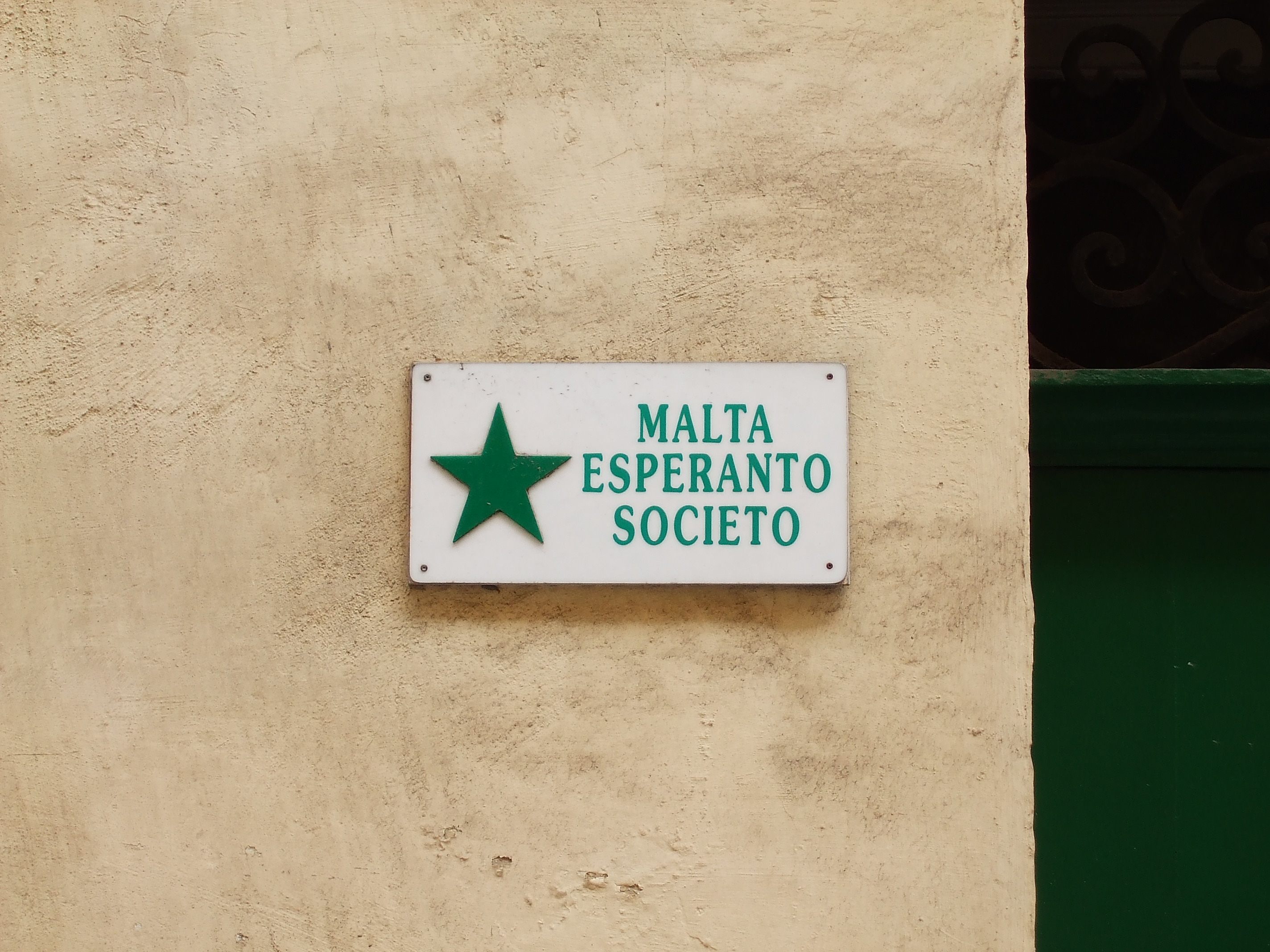 Malta Esperanto Societo